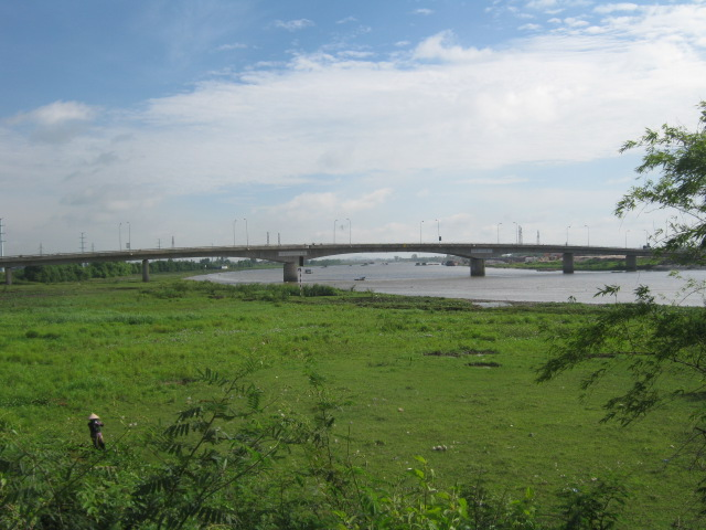 cầu Non Nước nhìn từ trước khách sạn Non Nước - thành phố Ninh Bình